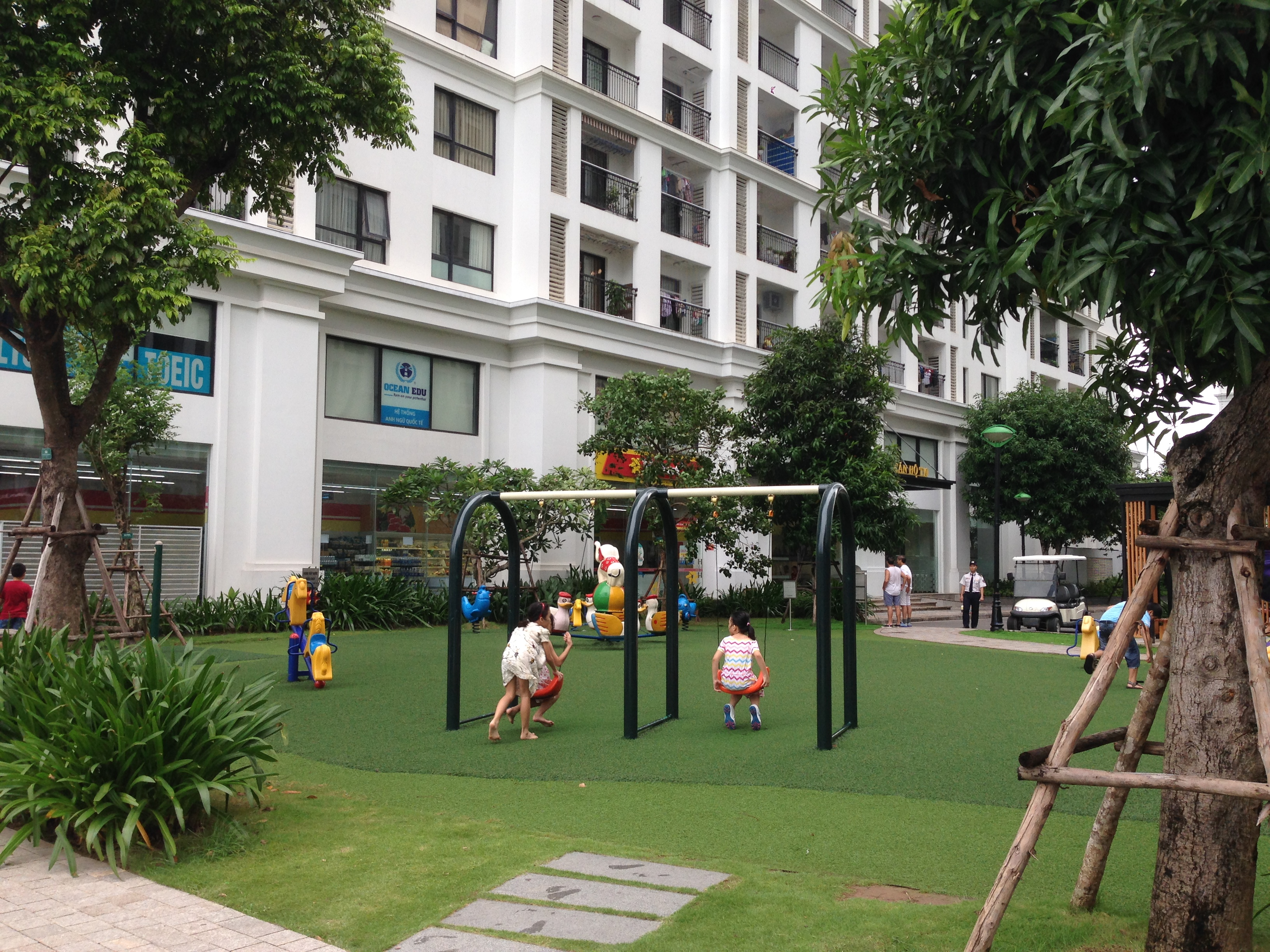 Sân chơi cỏ nhân tạo dành cho trẻ em Times City 02-09-2016